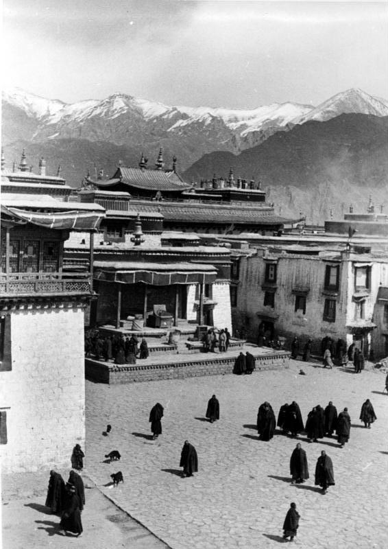 Lhasa, Straßenbild (vor dem Stadttempel)